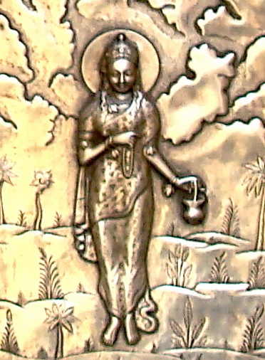 Brahmacharini, Jaipur.